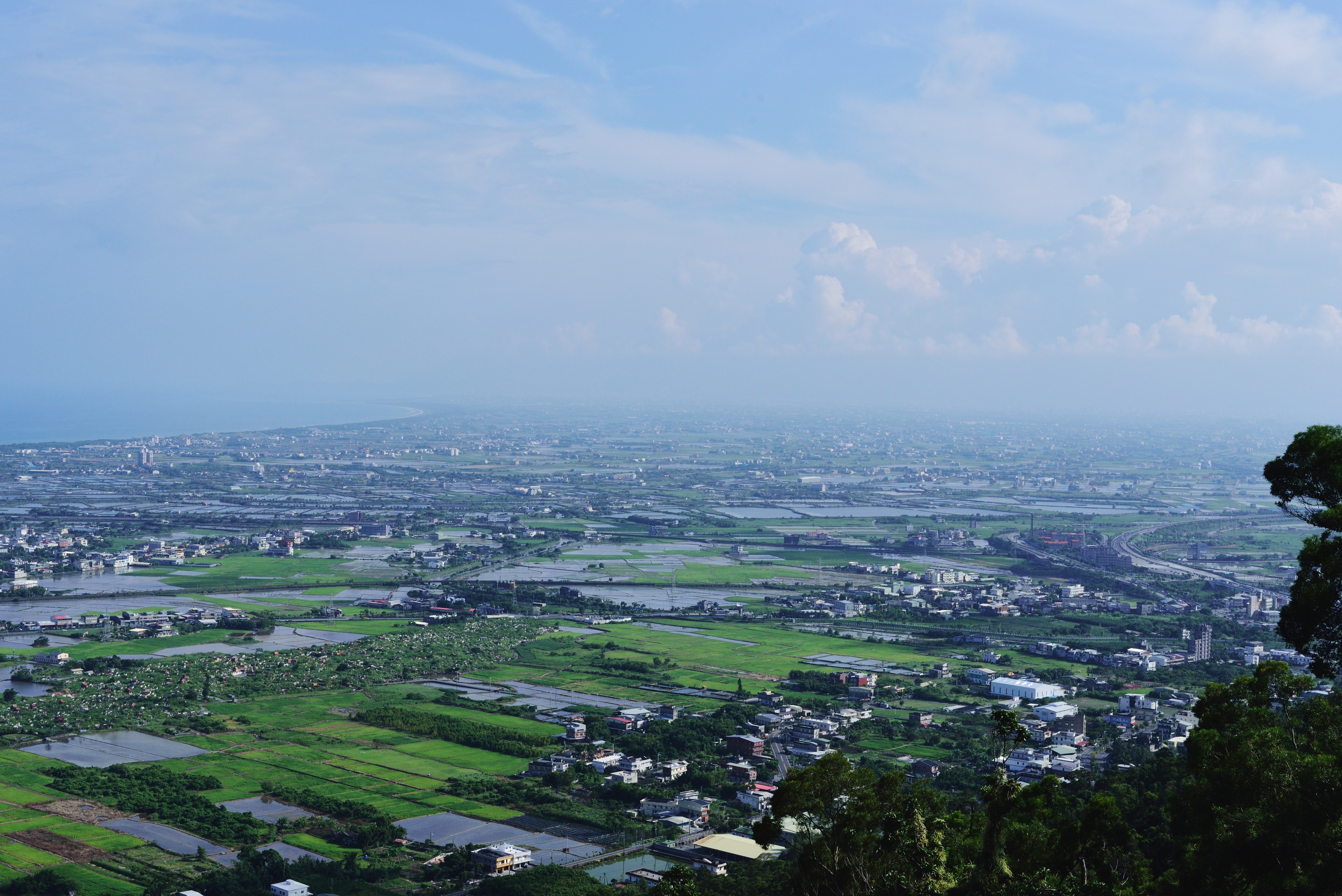 48-回家路上，北宜蘭陽平原景緻